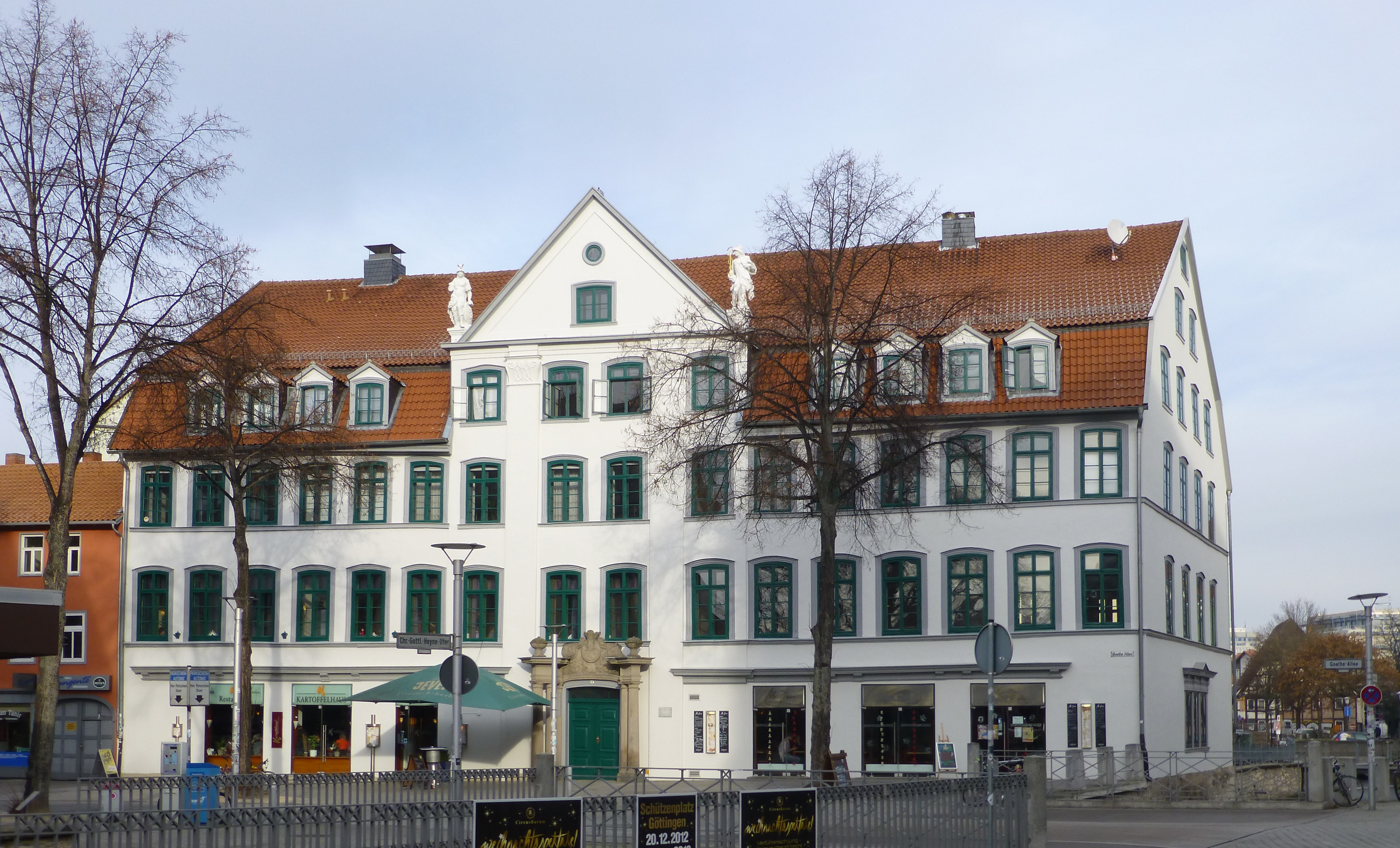 Grätzelhaus am Leinekanal in der Goethealle 8 in Göttingen, Niedersachsen. Schaufassade zur Straßenfront. Erbaut 1739-41 als Wohnhaus des Tuchherstellers Johann Heinrich Grätzel und Haupthaus der Tuchmanufaktur.